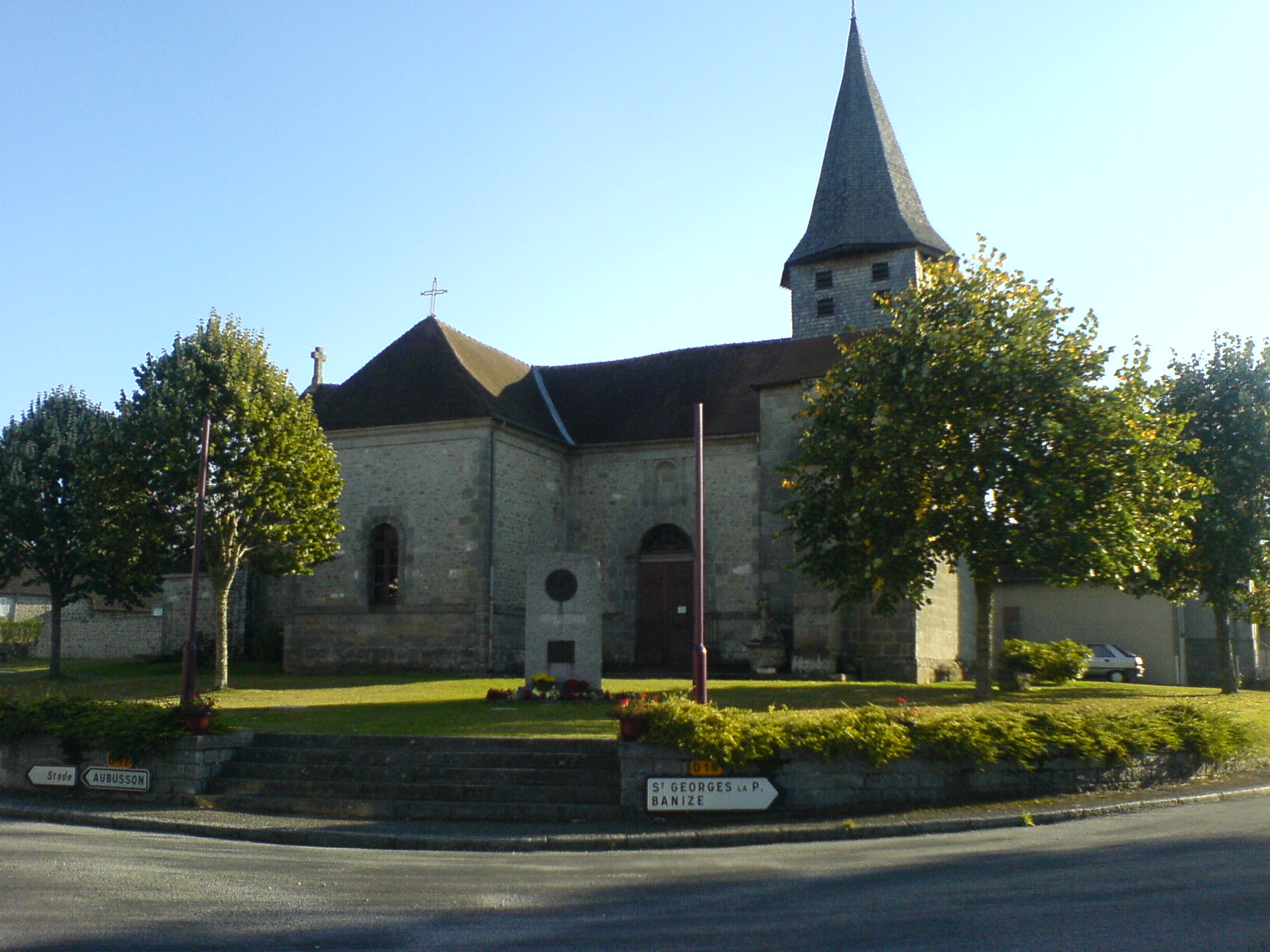 place du village